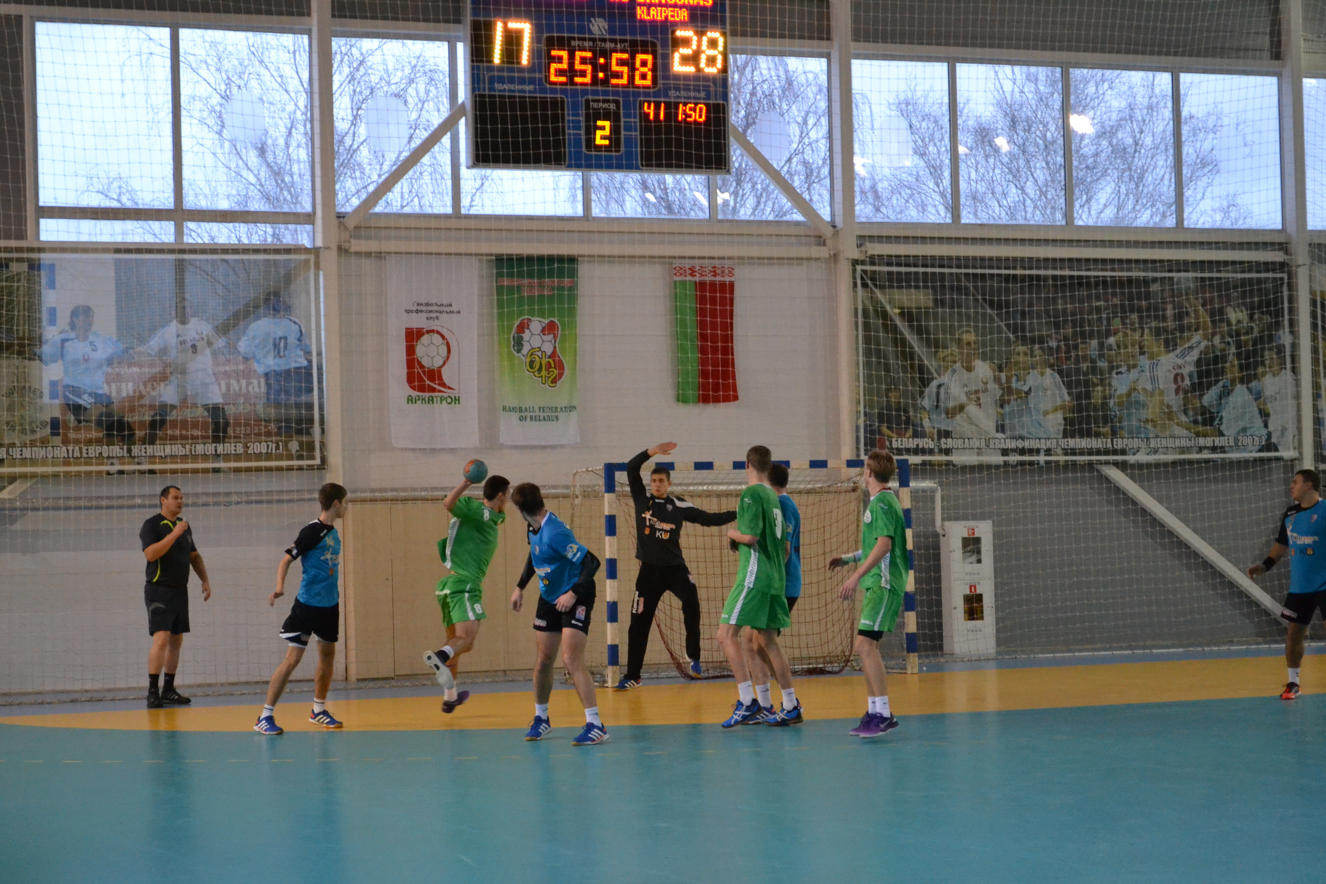 Беларуская (тарашкевіца): Матч Балтыйскай лігі «Віцязь-РДВАР» (Беларусь) — «Жэмайтыяс Драгунас» (Летува). 8 сьнежня 2013